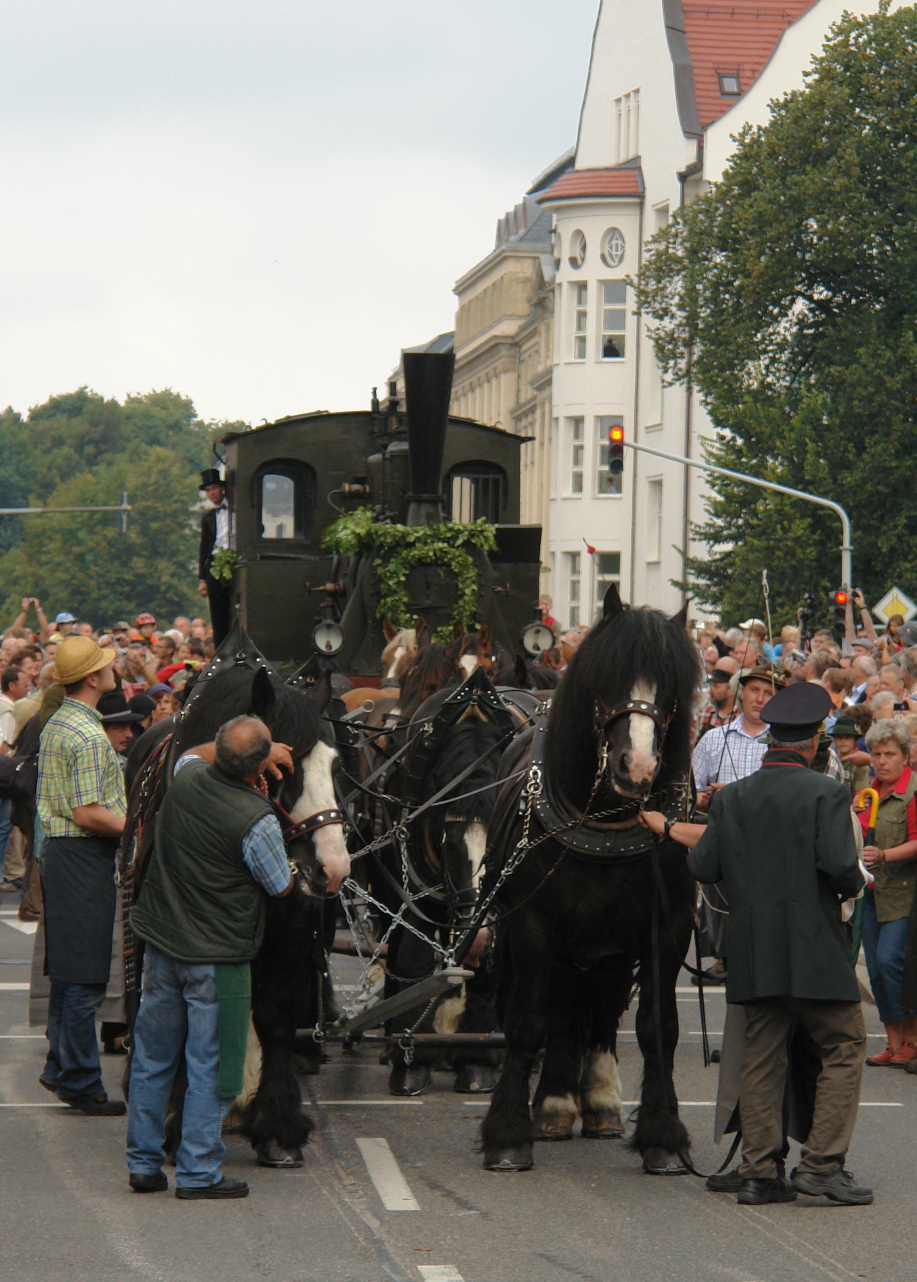 Fest-Transports der Hartmann-Lok mit 16 Pferden durch Chemnitz